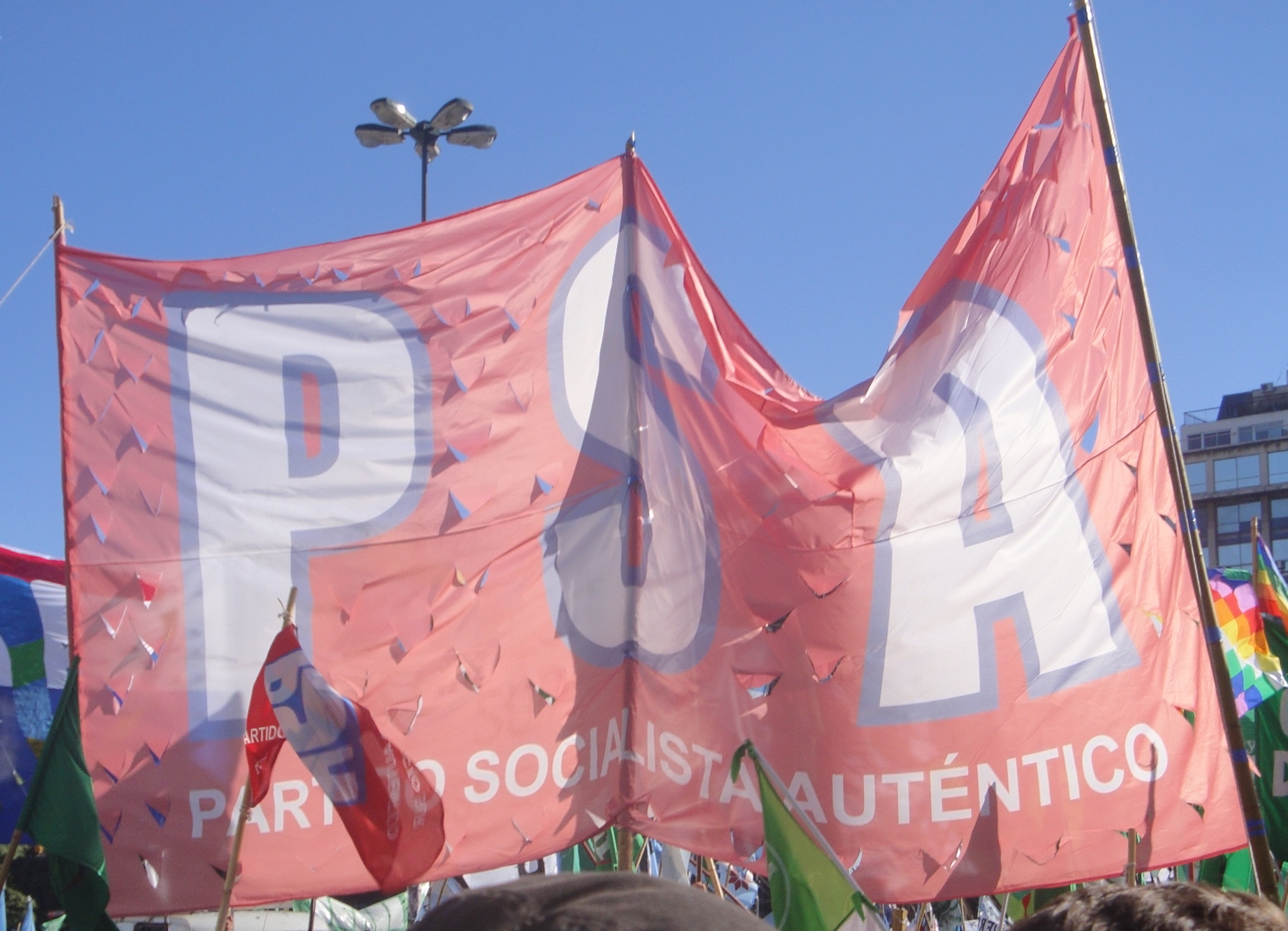 Bandera del Partido Socialista Autentico durante la manifestación en conmemoración al 35º aniversario del golpe de Estado en Argentina de 1976.